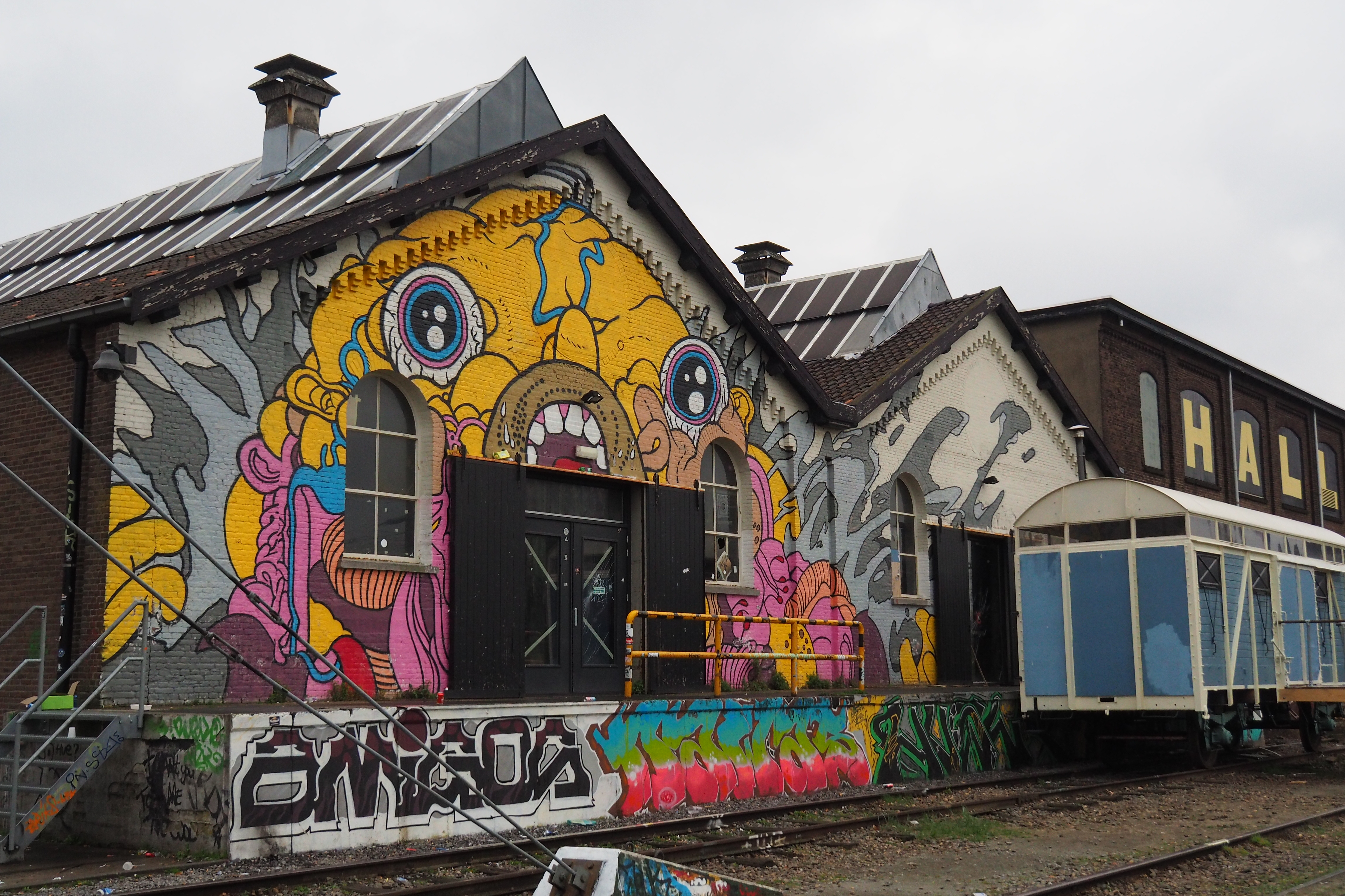 NS werkplaats Tilburg